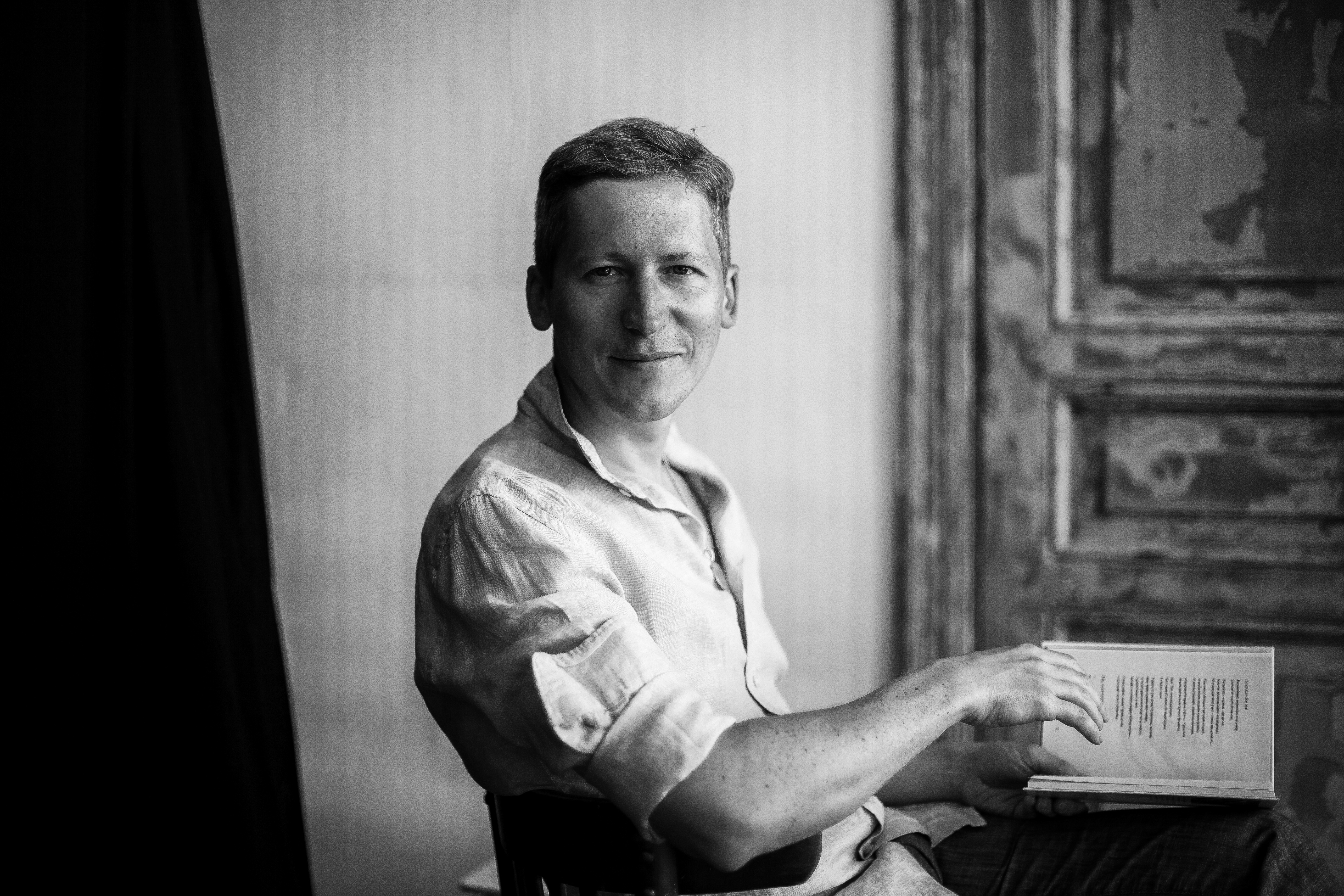 Портрет поэта Дмитрия Макарова работы Иры Полярной